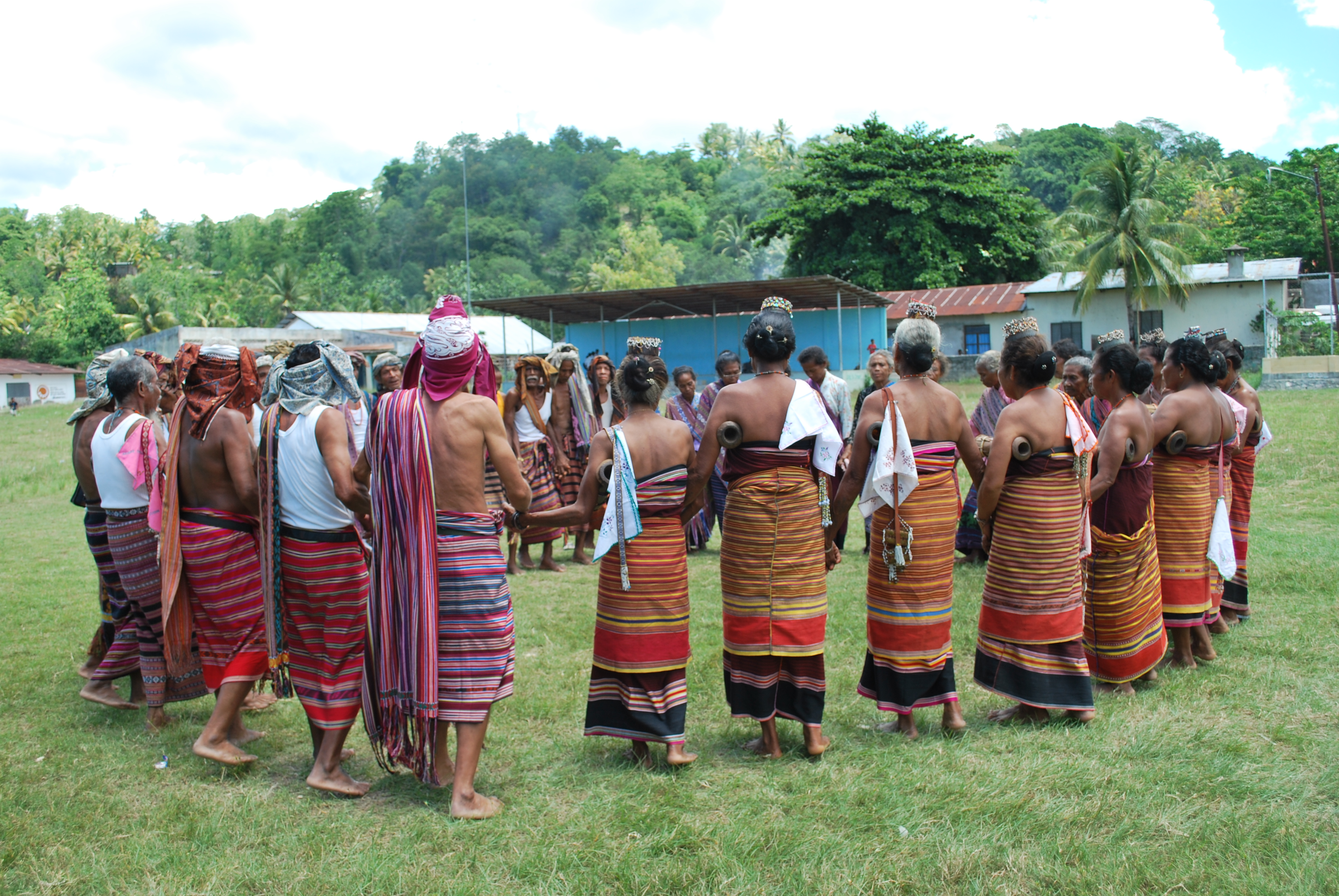 Tänzerinnen in Viqueque beim Tebe Dahur-Tanz